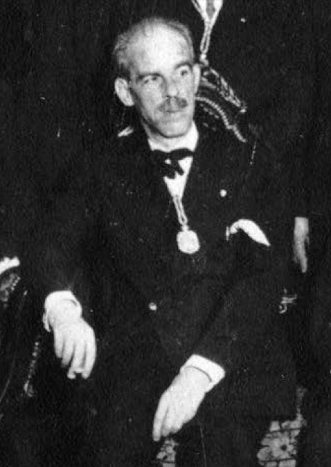 Antón Villar Ponte. Recepción de Castelao na Real Academia Galega na Coruña o 25 de xullo de 1934.